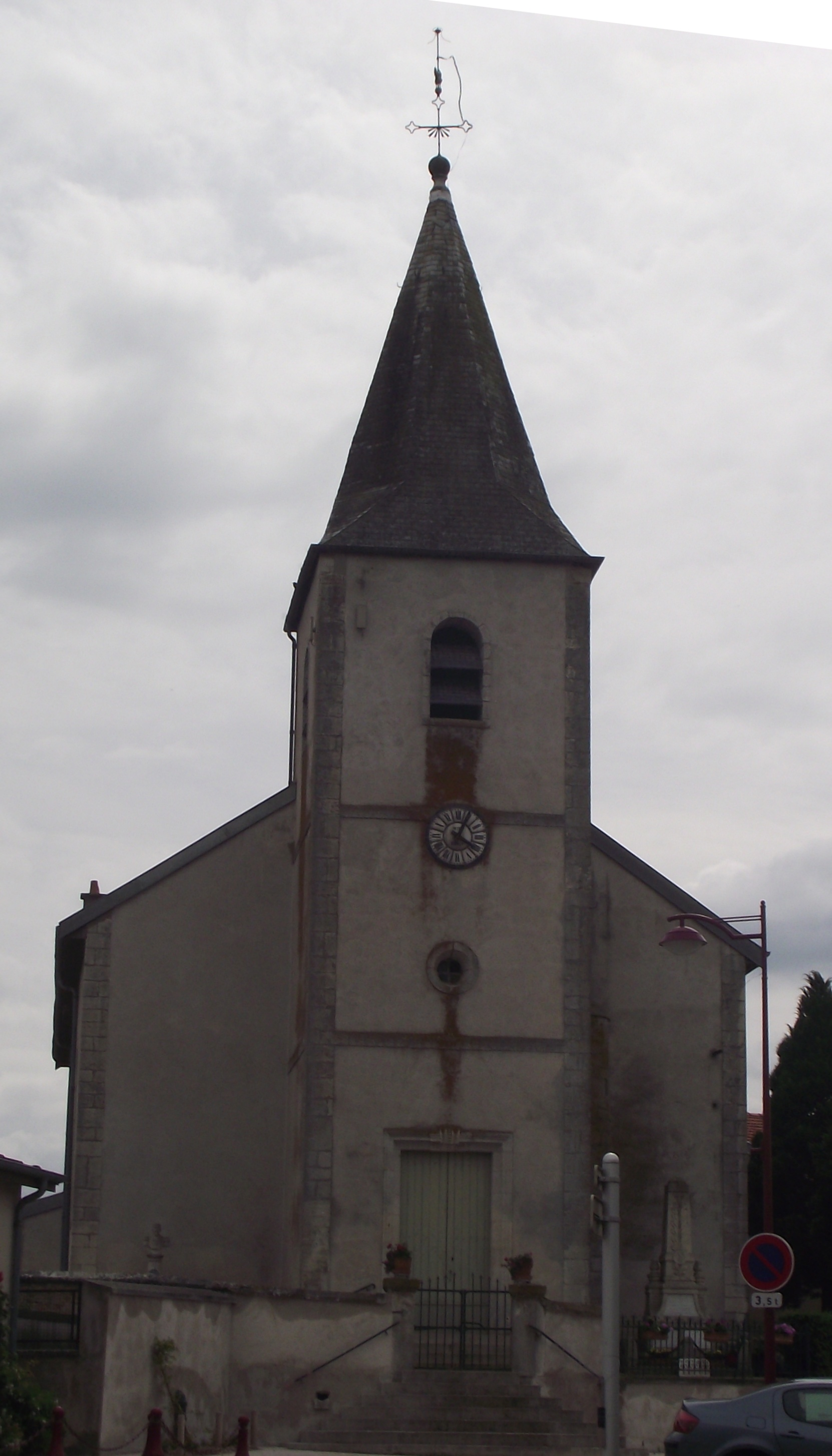 église de Crézilles